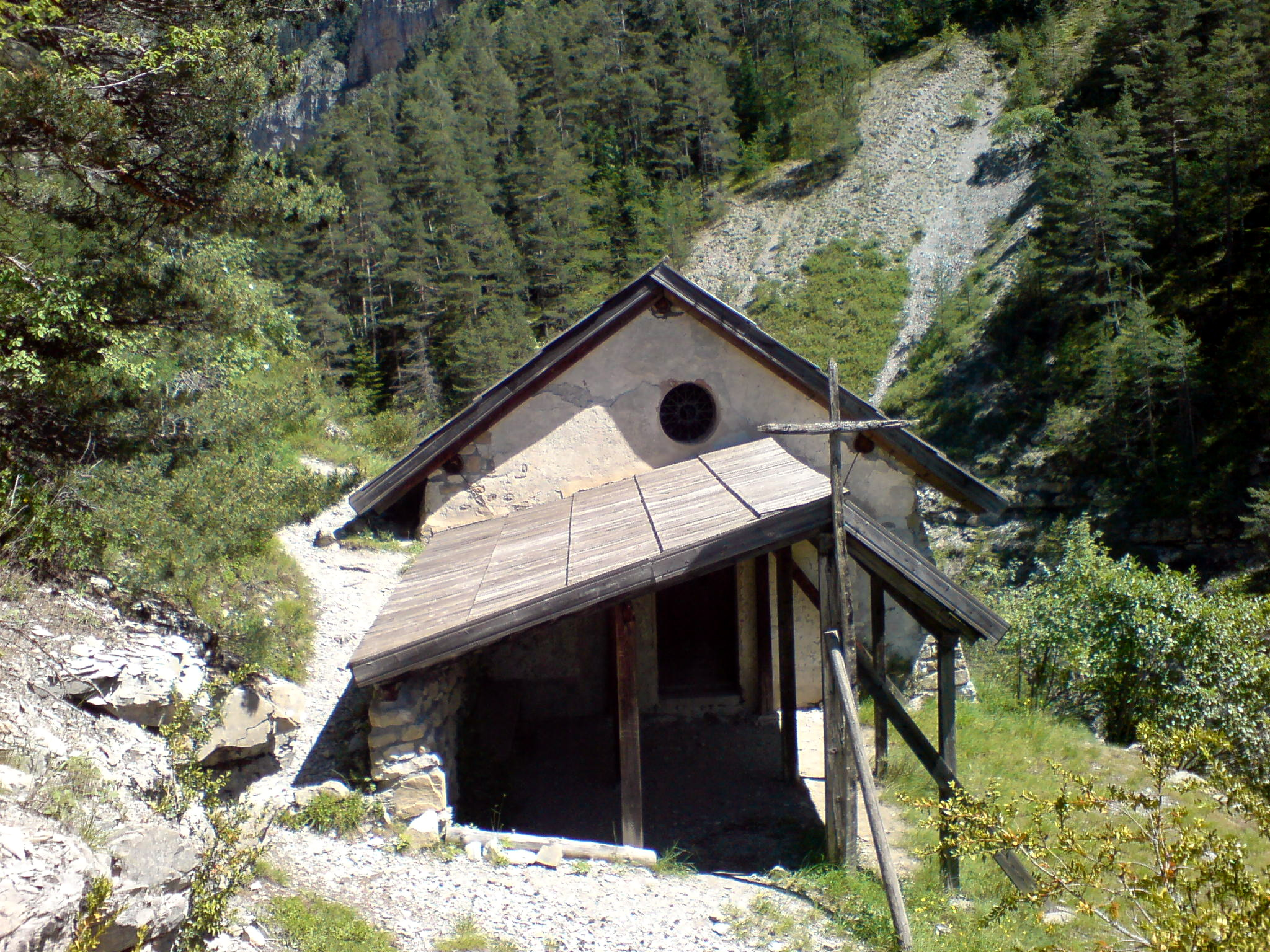 Chapelle Saint-Pierre, au fond des gorges de Saint-Pierre